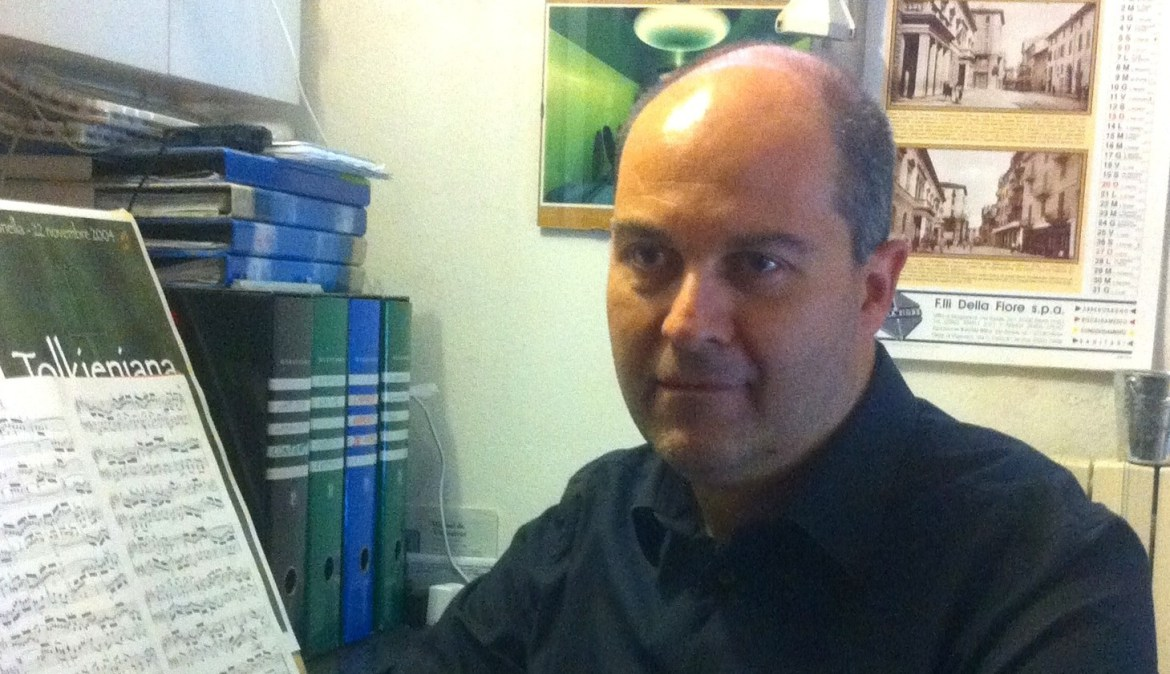 Edoardo Volpi Kellermann